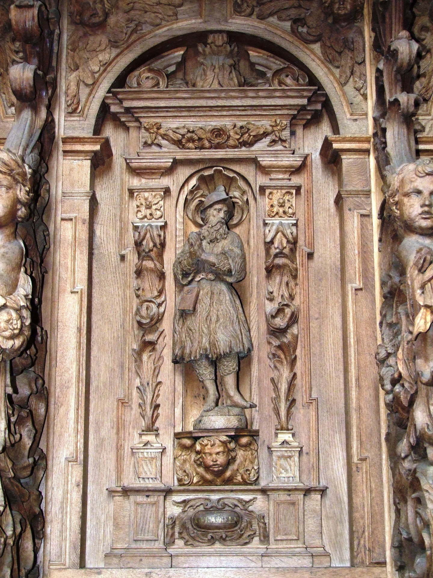 Das Chorgestühl in der Klosterkirche des ehemaligen Kartäuserklosters Buxheim: Wilhelm von Maleval